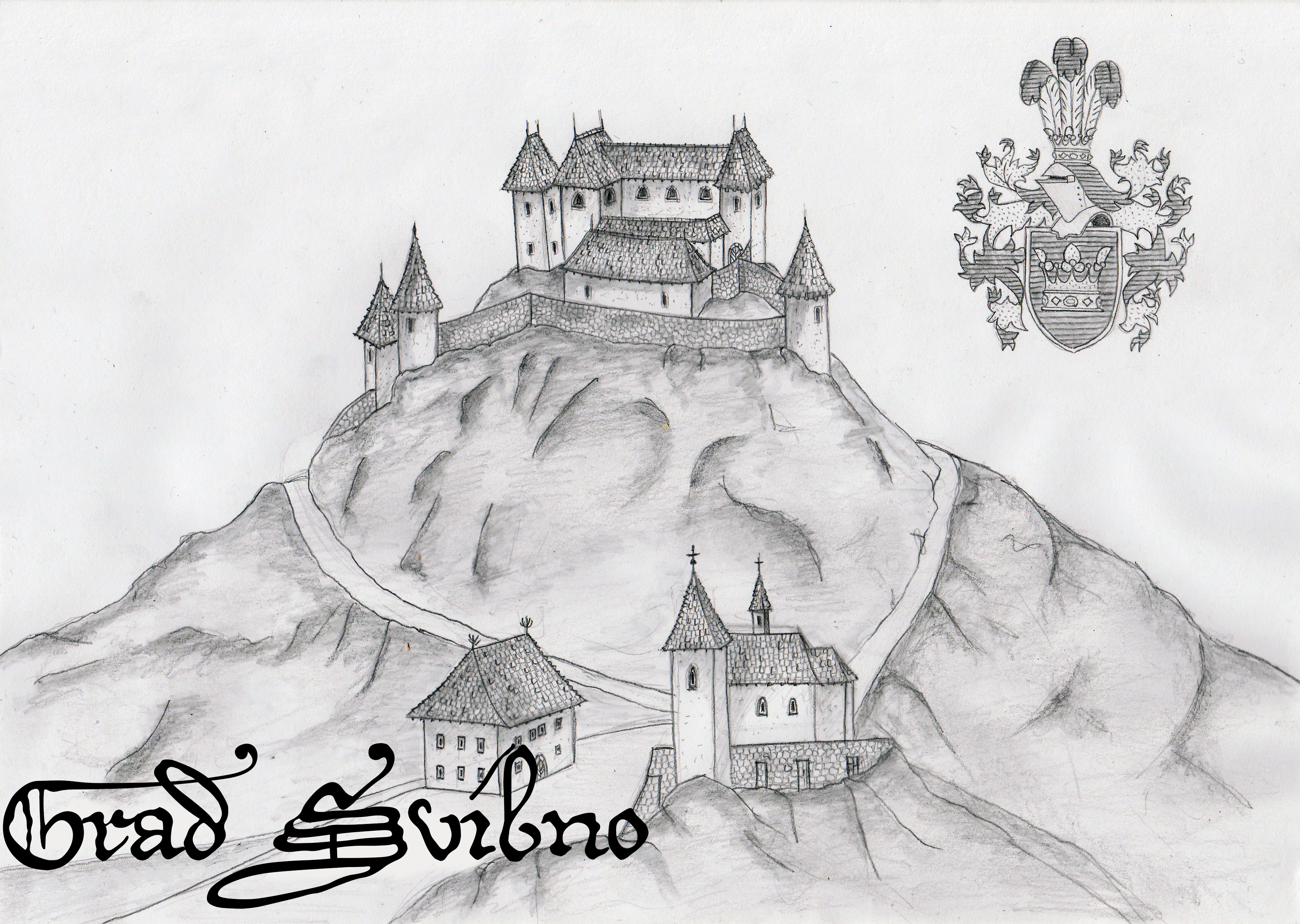 Poskus rekonstrukcije gradu Svibno pri Radečah